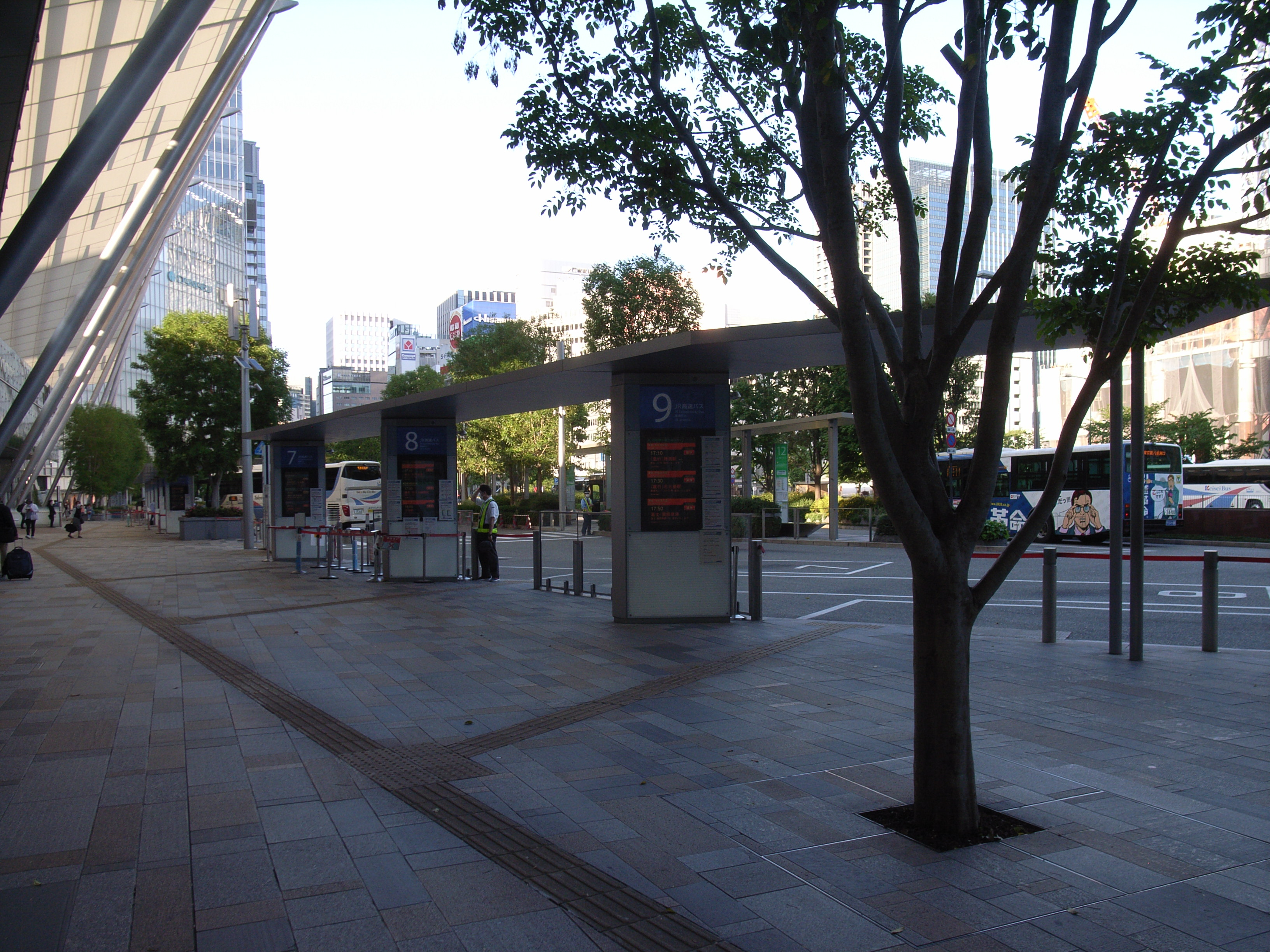 新型コロナウイルスの影響で利用者の姿が全くない東京駅八重洲南口の高速バス乗り場。減便したバスも無乗客で出発してゆく。